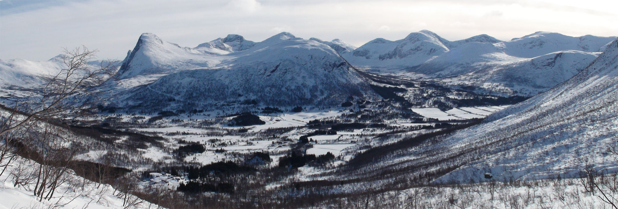 Panorama av Terdalen (høytliggende) og Knutsdalen som er to av sidedalene i Hornindal.